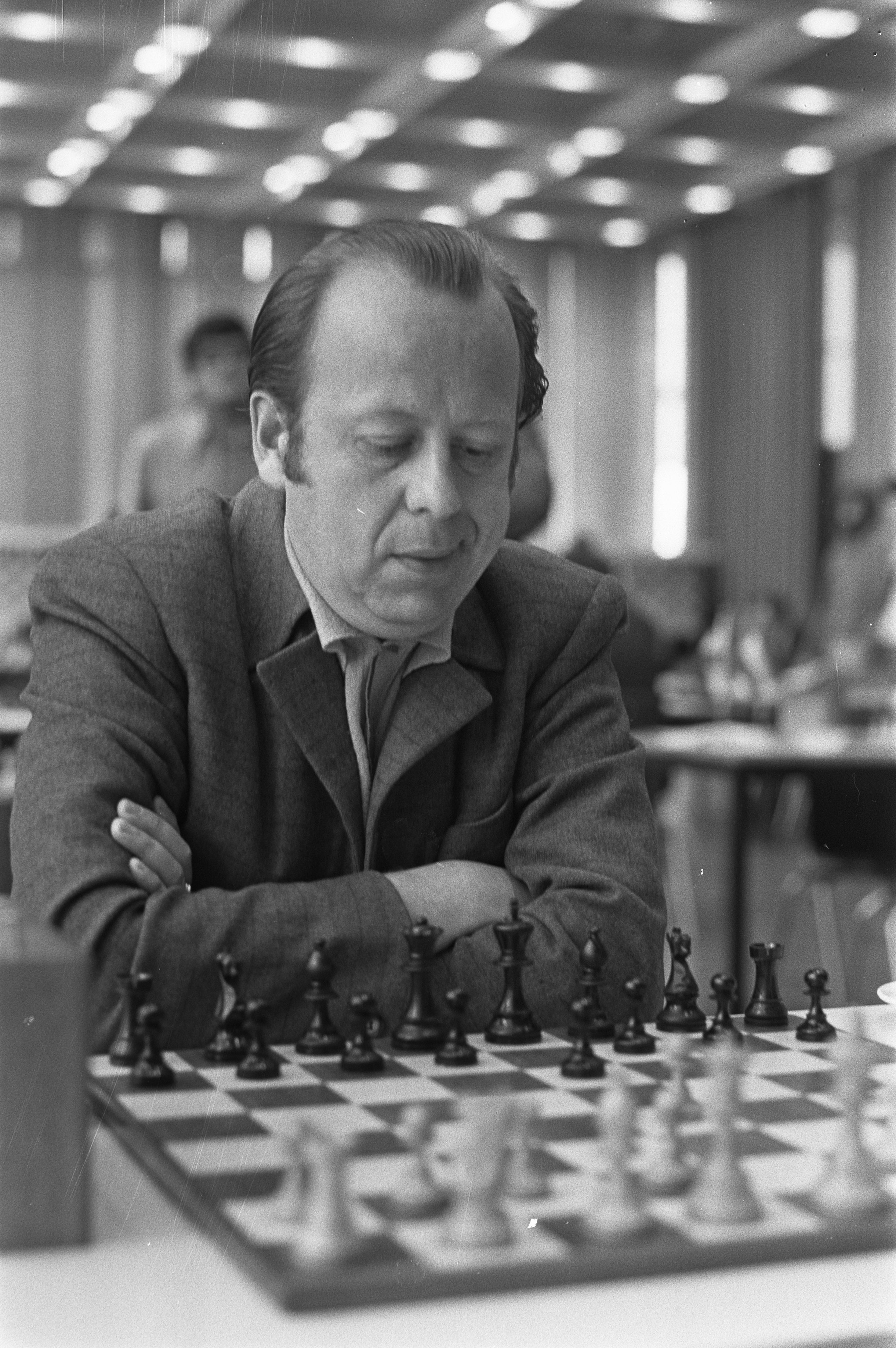 De Duitse schaker Wolfgang Uhlmann, IBM-schaaktoernooi 1972 in de RAI te Amsterdam.